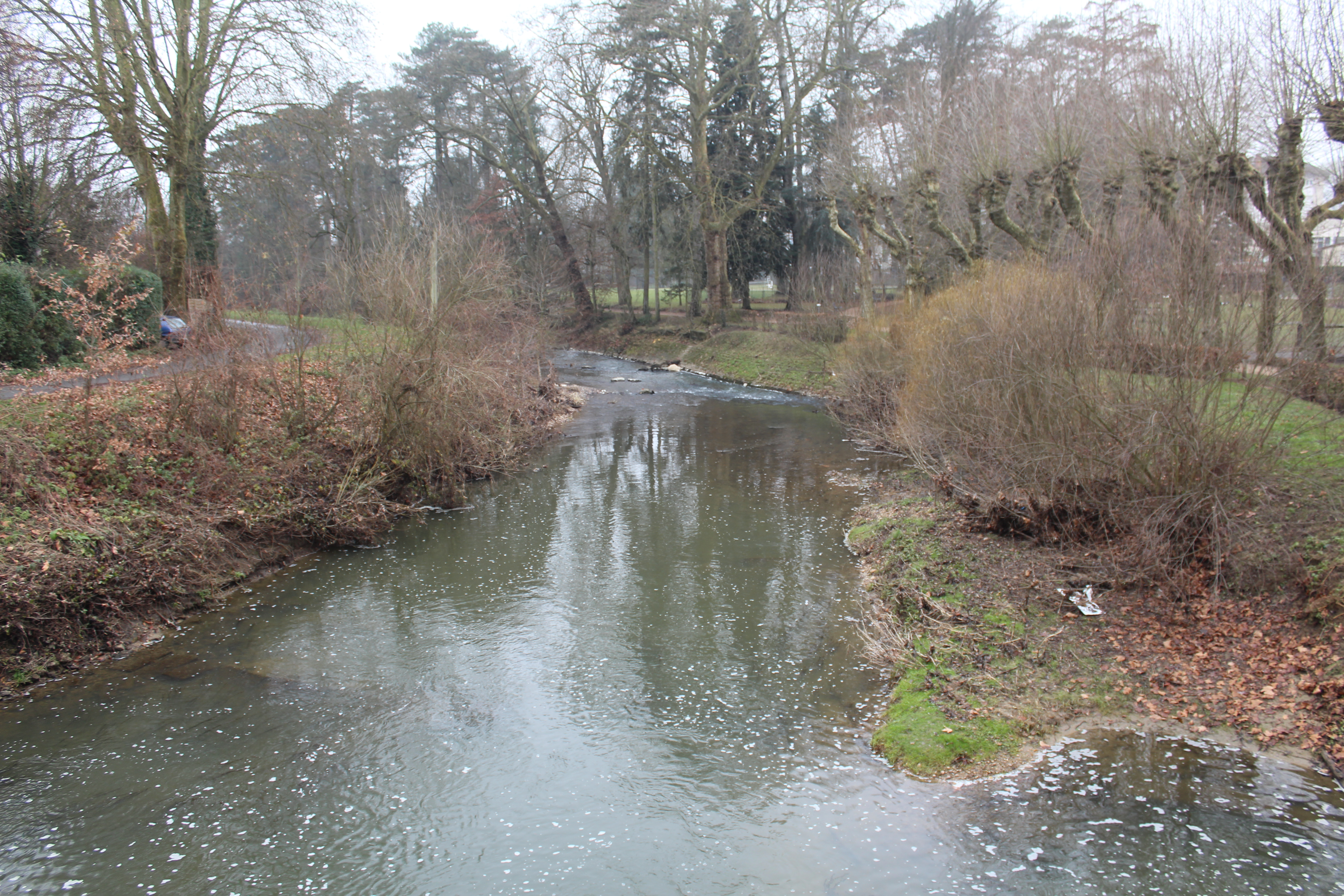 La Chalaronne entre Thoissey et Saint-Didier-sur-Chalaronne près de l'Hôpital de Thoissey.